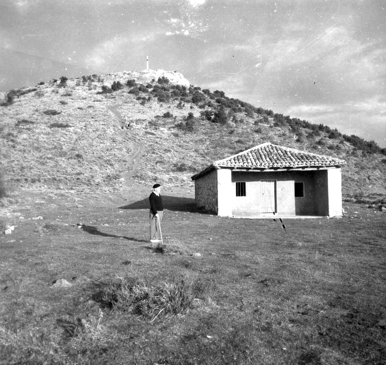 Lemoatx mendi tontorra (Lemoa)